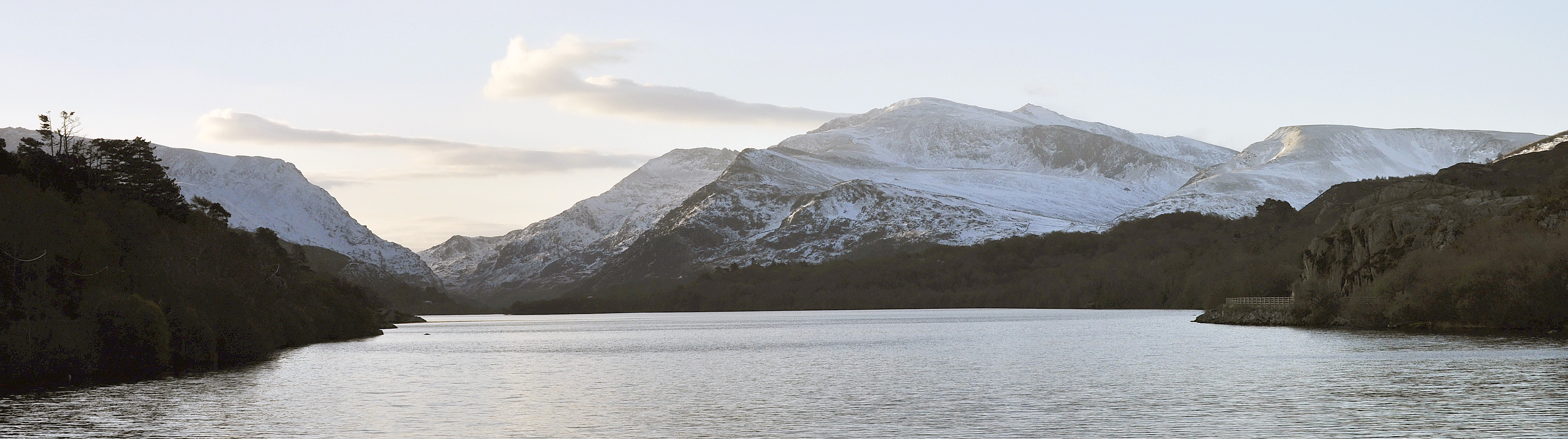 Beautiful Snowdonia mountains&lake padarn